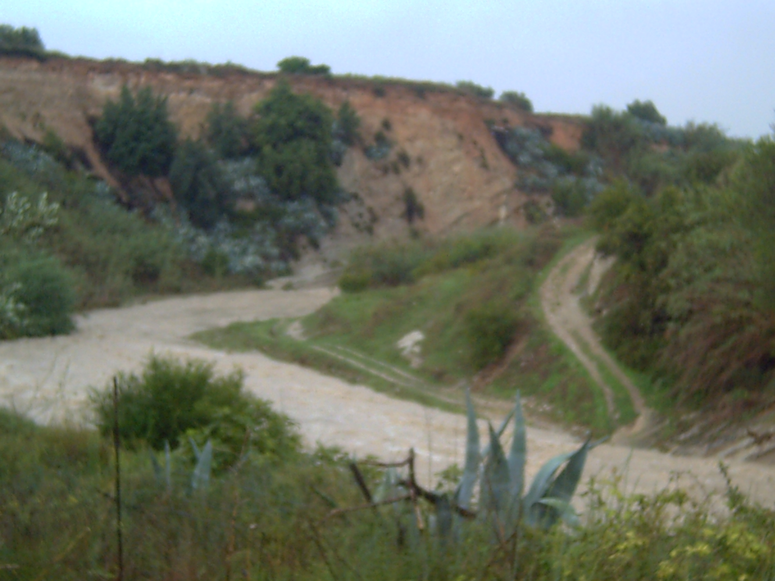 Riu Clariano.